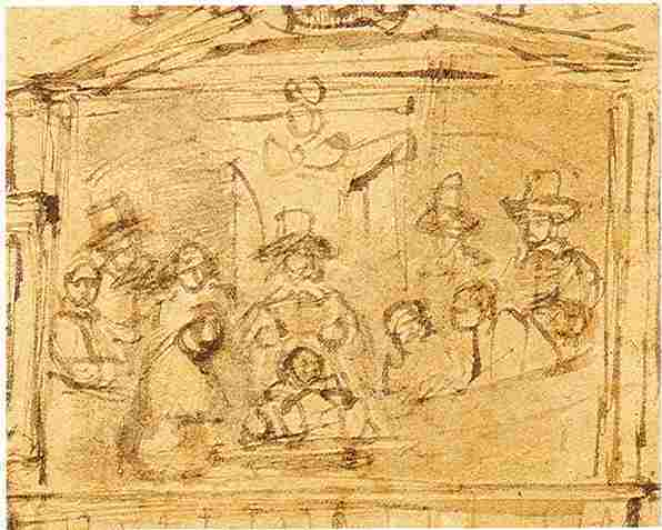 Situatieschets met de ‘Anatomische les van Dr. Deijman’. Alternative title(s): Entwurf zur anatomischen Vorlesung des Doktor Joan Deyman.[1] La leçon d’anatomie du Professeur Joan Deyman. Model van het Schilderij van Rembrandt, op de Anatomijkamer, te Amsterdam.